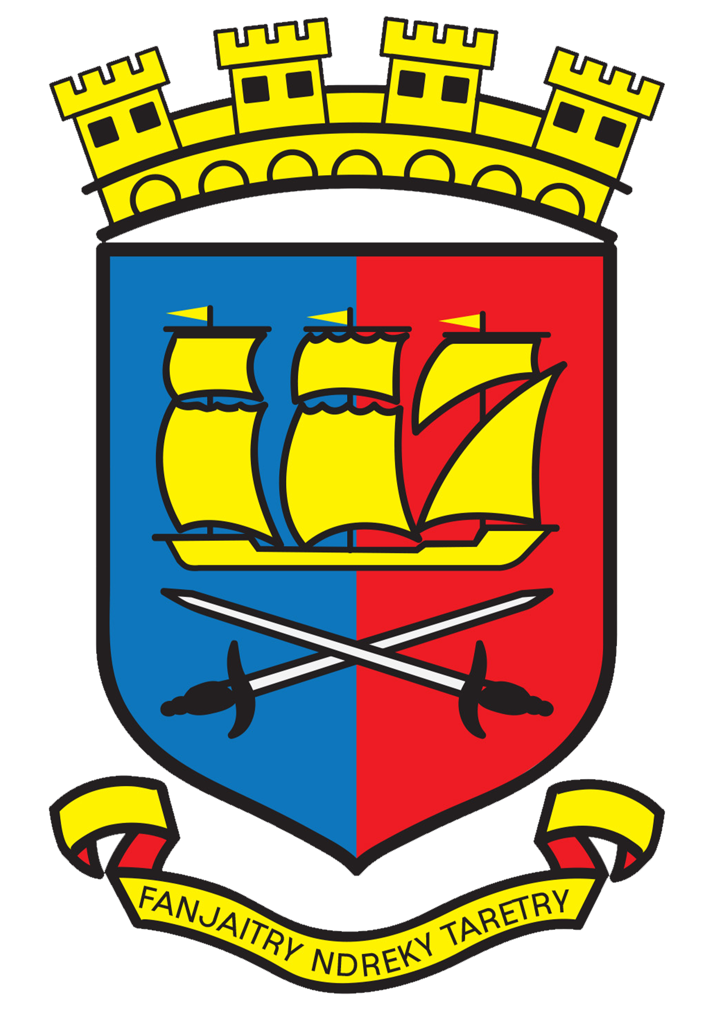 Représentant la ville, elle symbolise la piraterie qui a occupé une grande partie de l'histoire de la ville.